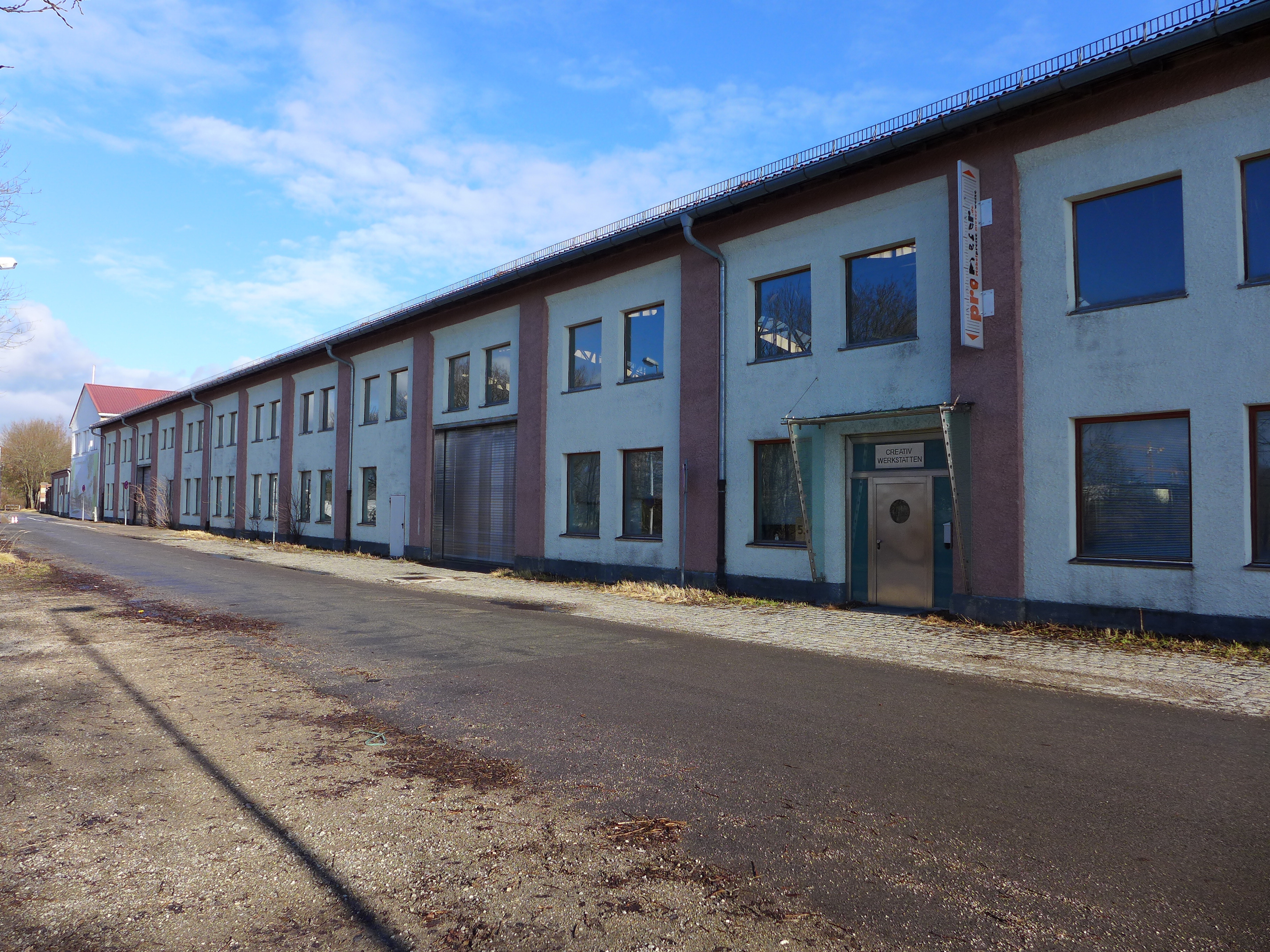 Papinstr. 53 Bau 12, München